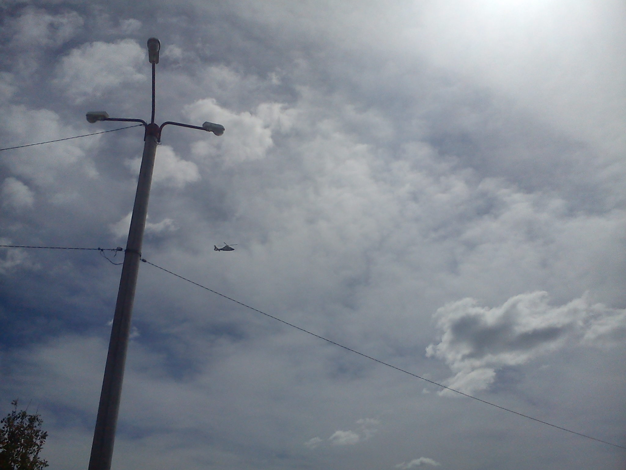 Dias de escasez de agua en Caleta Olivia